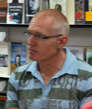 Josep Pastells Mascort firmando libros en la Feria del Libro de Madrid.